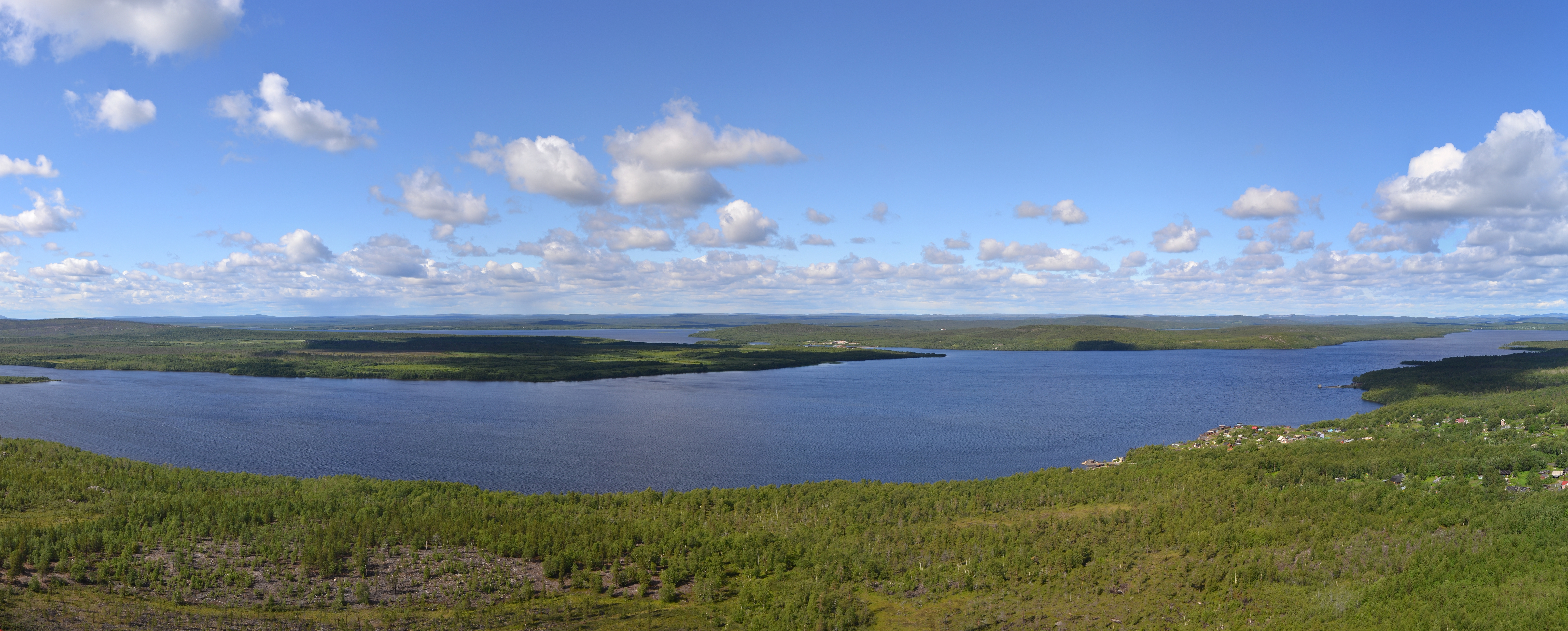 Вид на северо-запад. 2011 г.